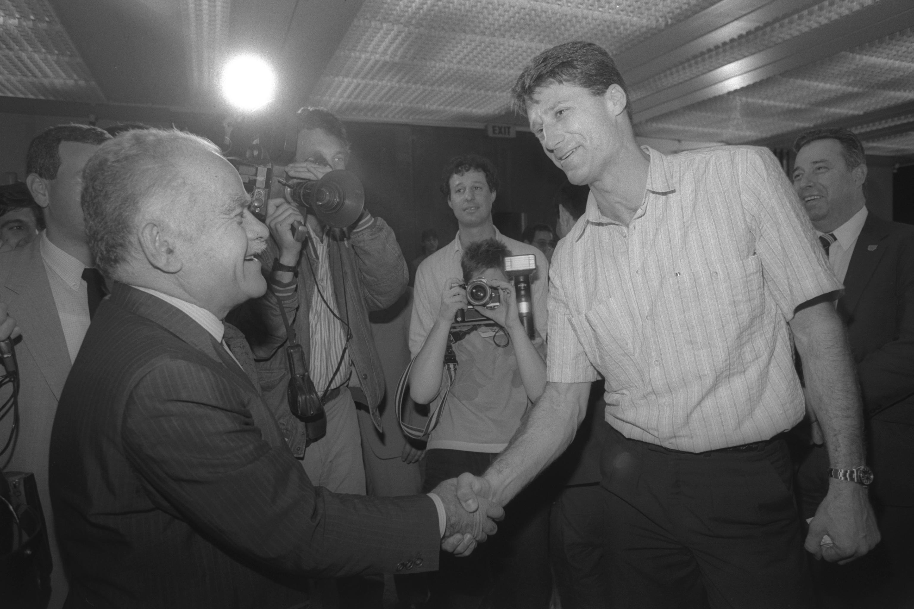 Prime Minister Yitzhak Shamir shakes hands with basketball star Mickey Berkowitz during a Maccabi Tel Aviv reception at the Dan Hotel in Tel Aviv. ראש הממשלה יצחק שמיר לוחץ יד לשחקן הכדורסל מיקי ברקוביץ', בקבלת פנים לכבוד מכבי תל אביב במלון דן בתל אביב. Photo: HERMAN CHANANIA, 04/07/1987